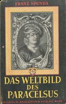 Franz Spundas Monographie "Das Weltbild des Paracelsus" (1941)